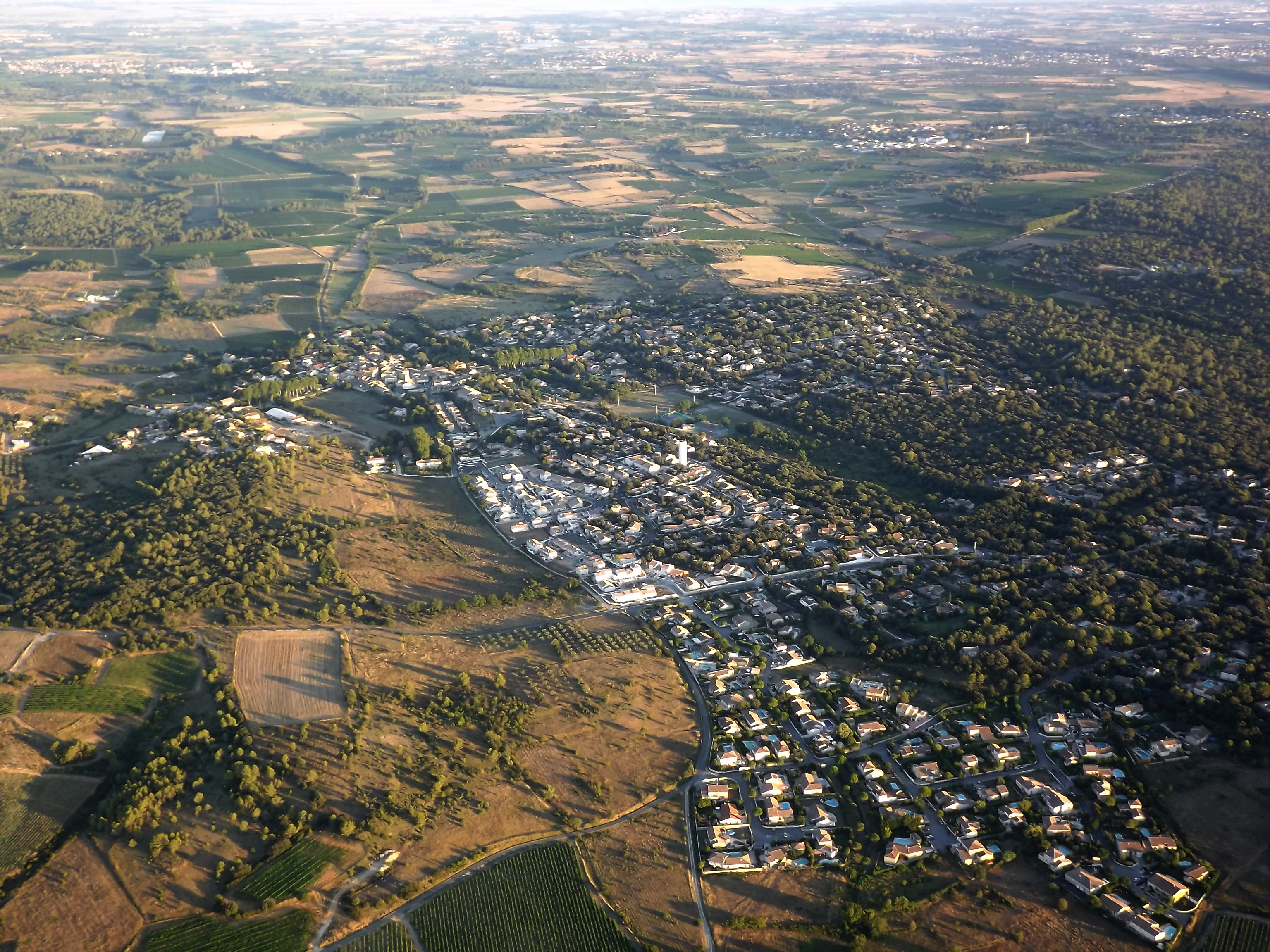 Vue aérienne de Restinclières (Hérault)